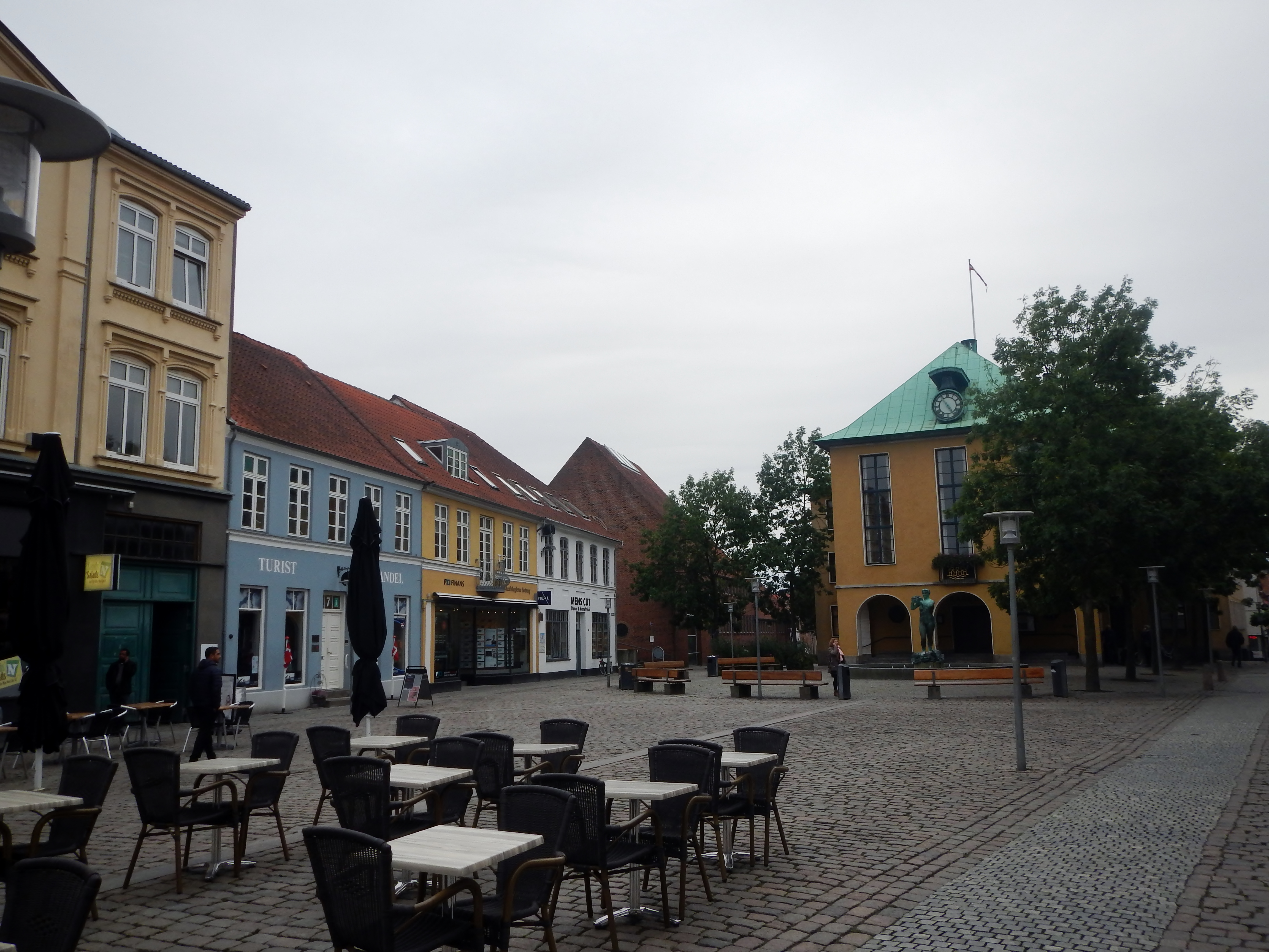 Sønderborg